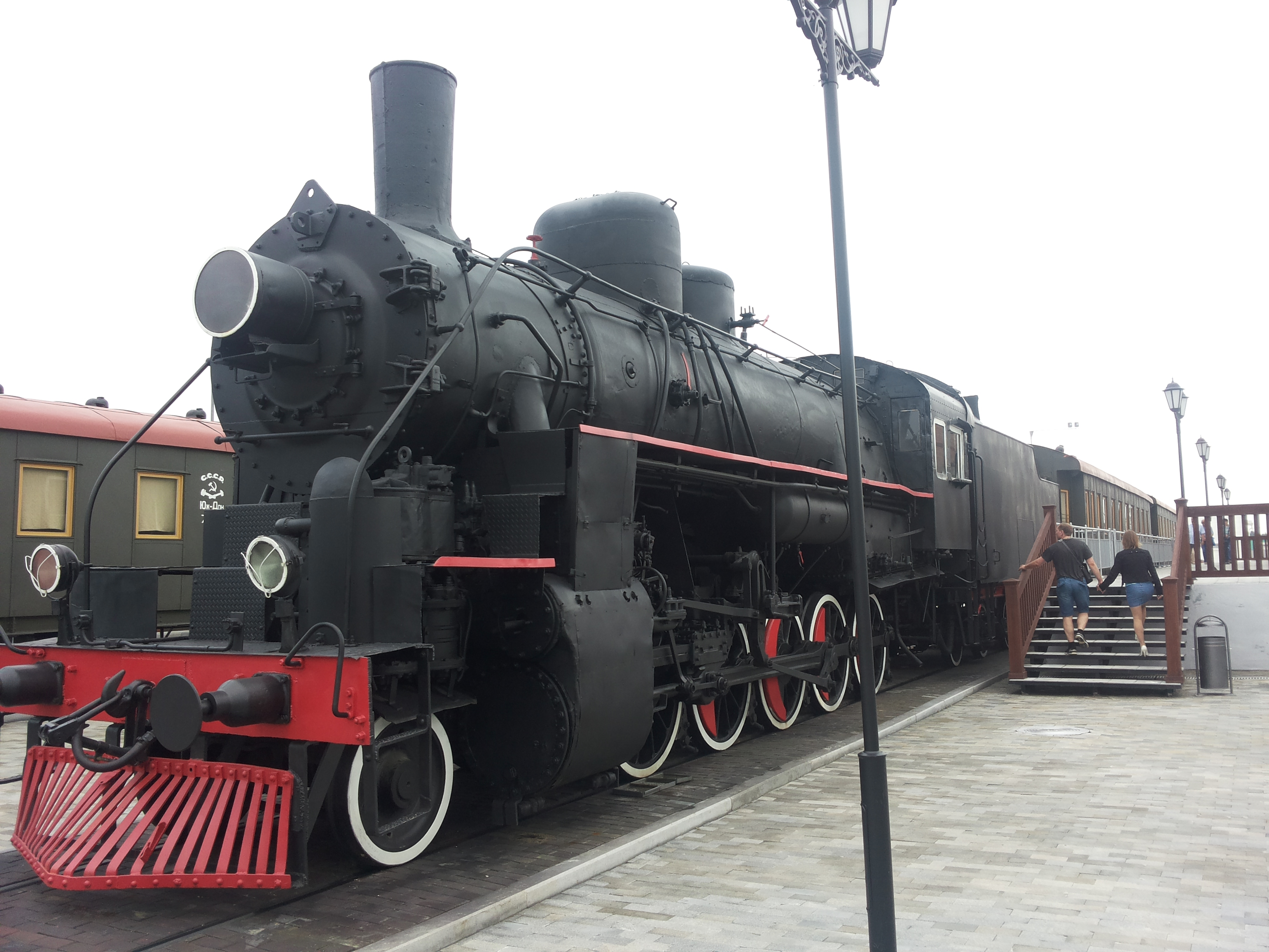 Музей военной техники «Боевая слава Урала»